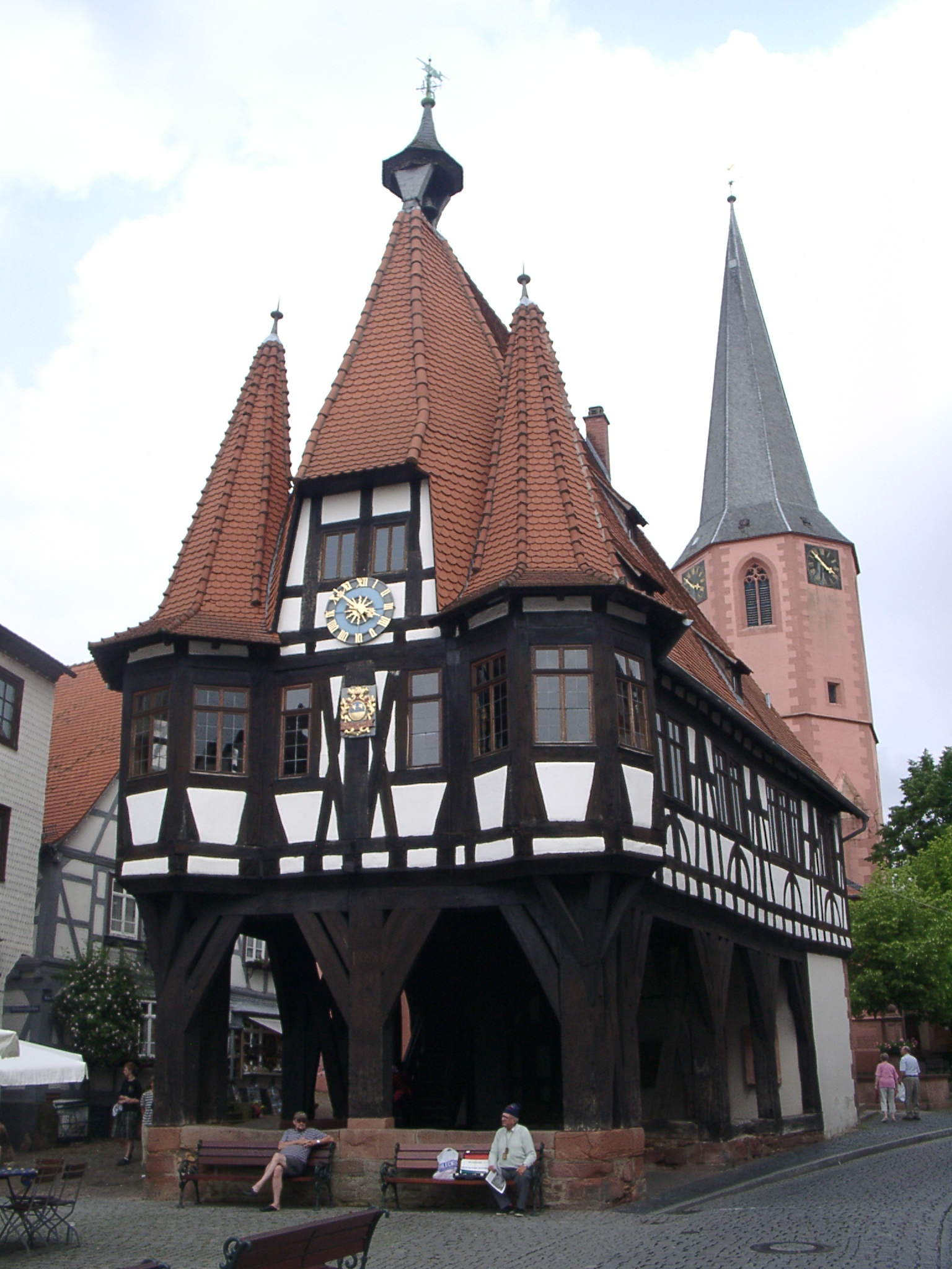 Michelstadt, Rathaus